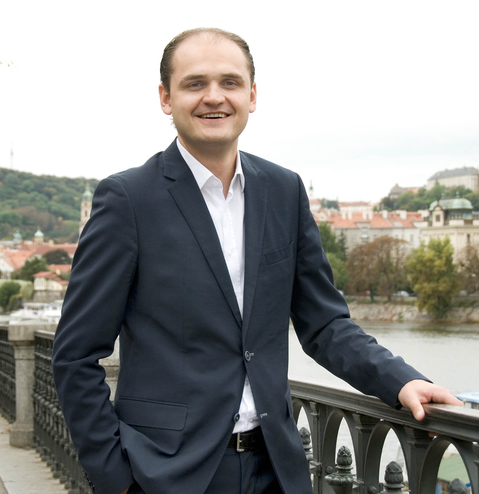 JUDr. Petr Šustek, Ph.D.